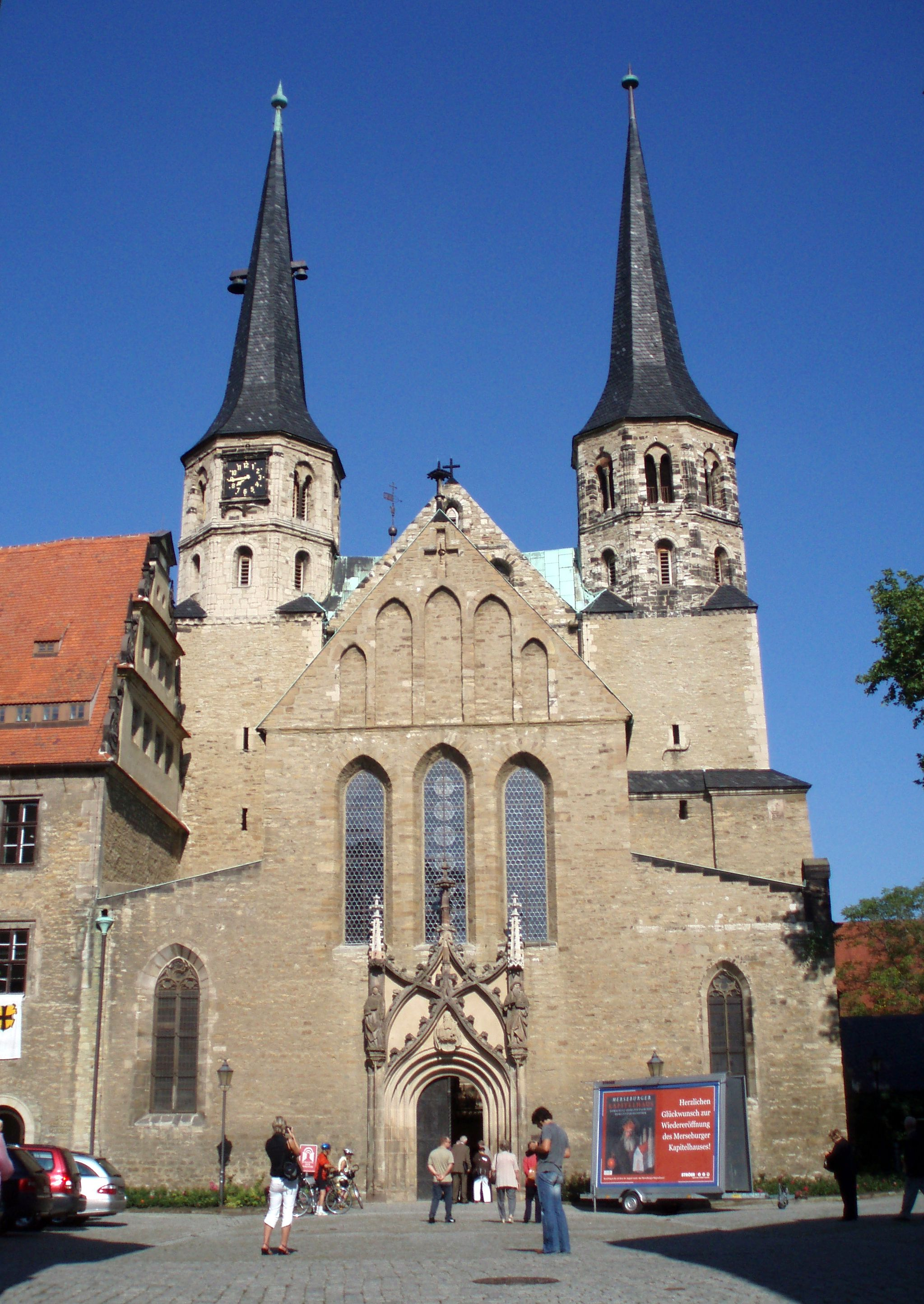 Der Dom zu Merseburg